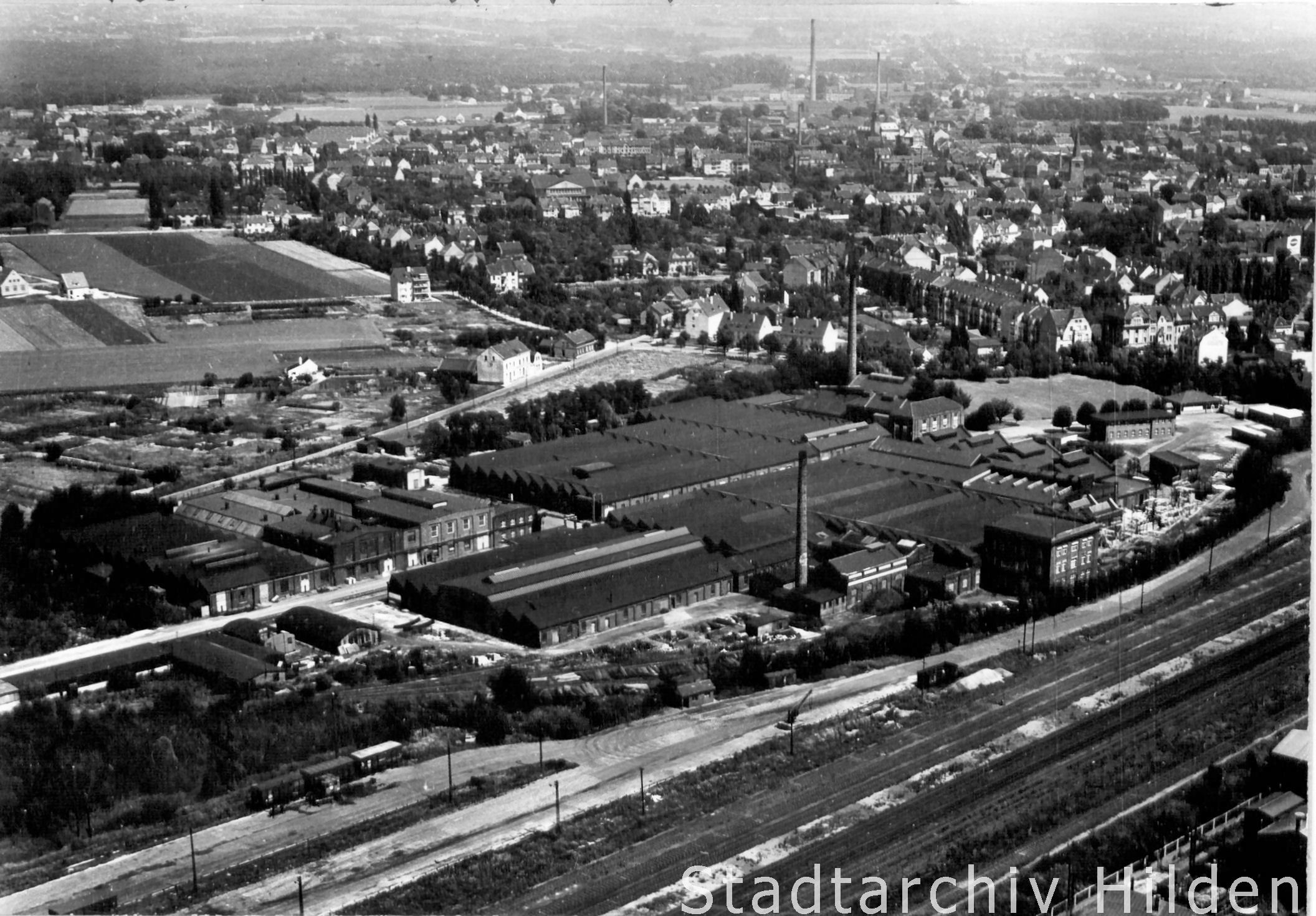 Luftbildaufnahme